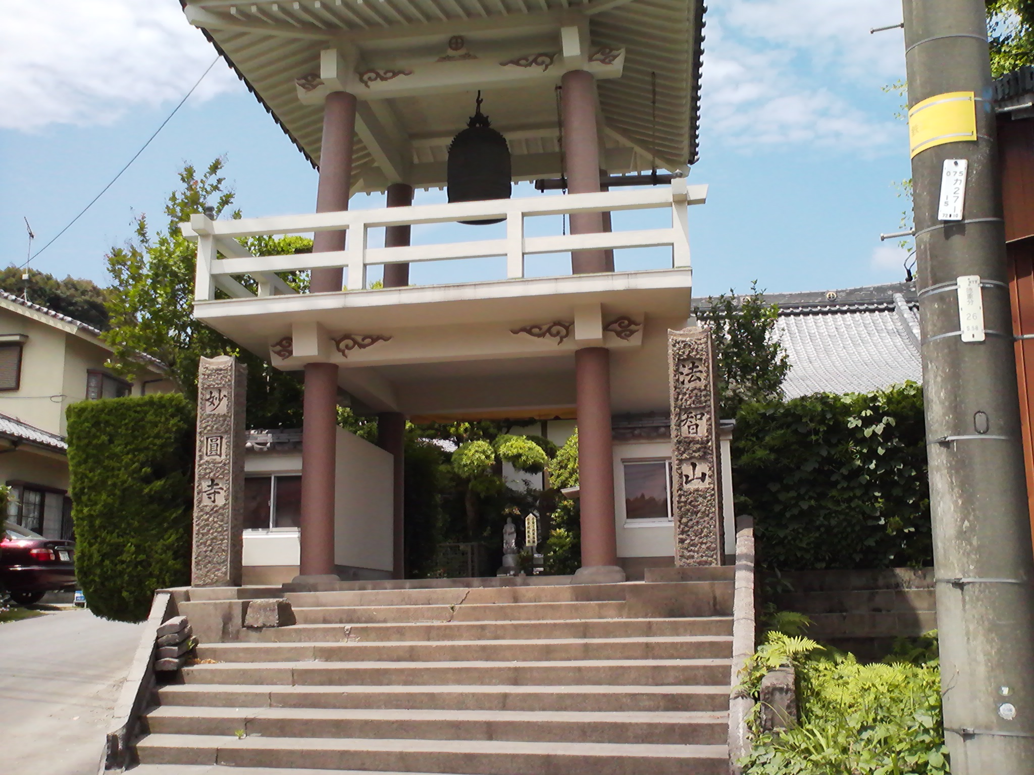 妙円寺の外観